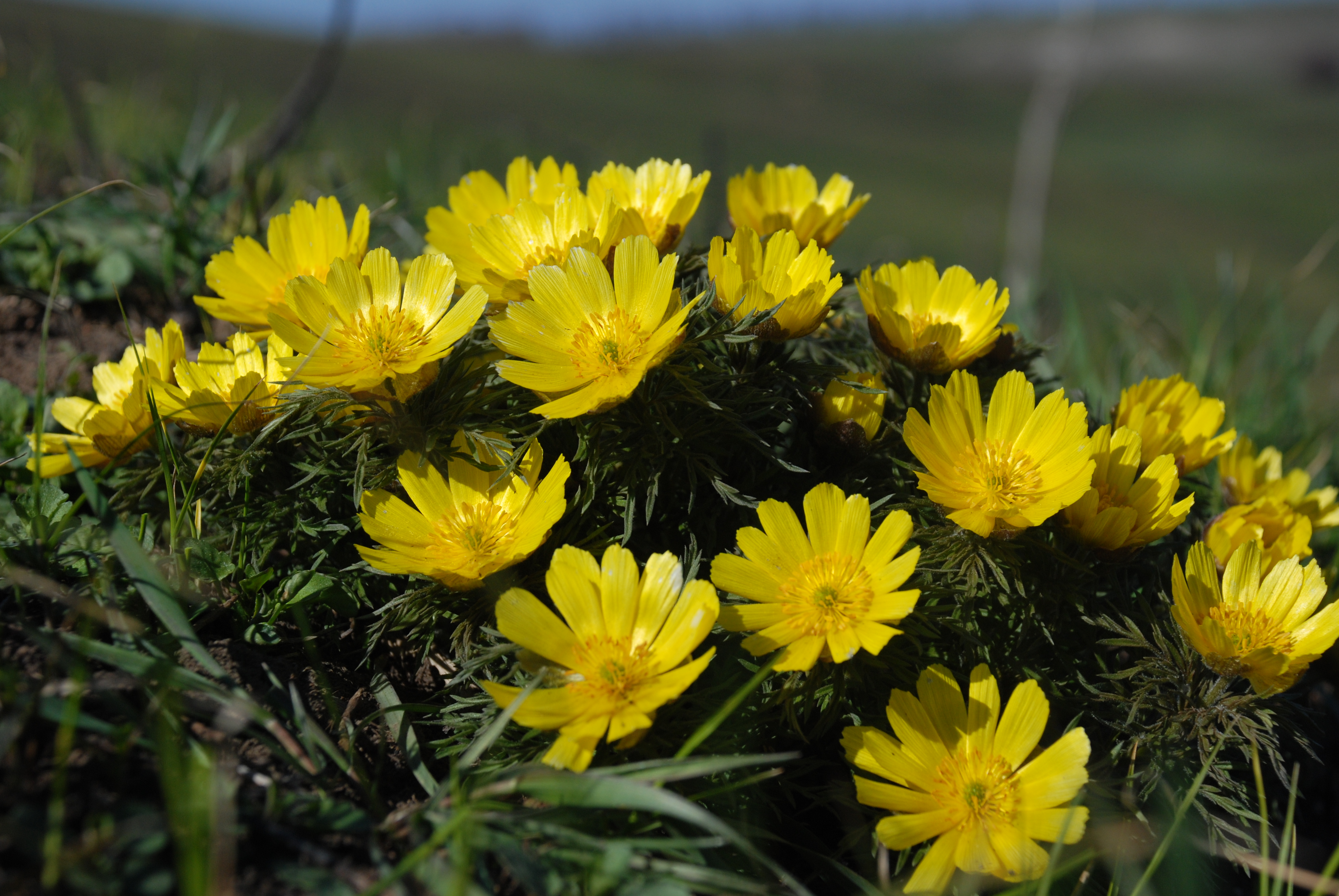 відділення «Стрільцівський степ», Міловський район с.Криничне